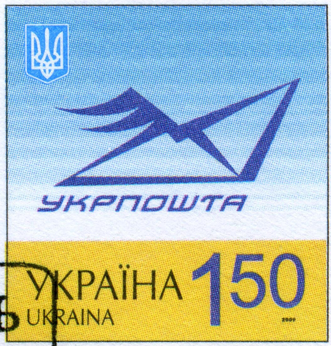 Поштова марка України